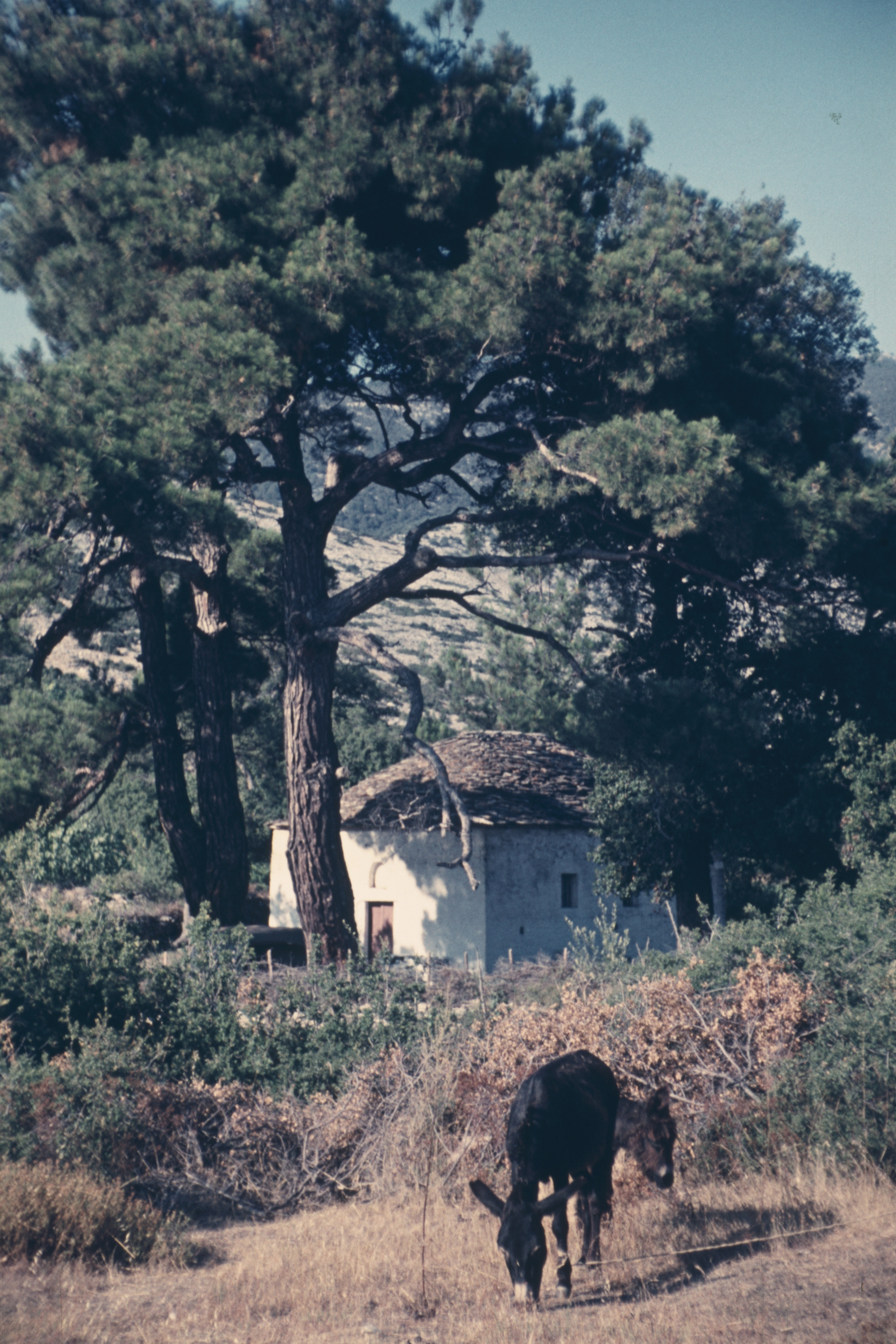 Agios Georgios vor Theologos (1958)